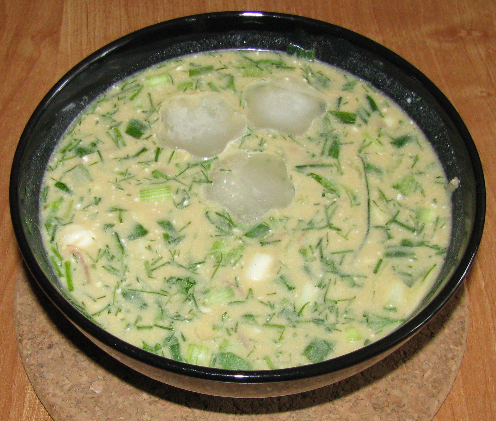 Окрошка